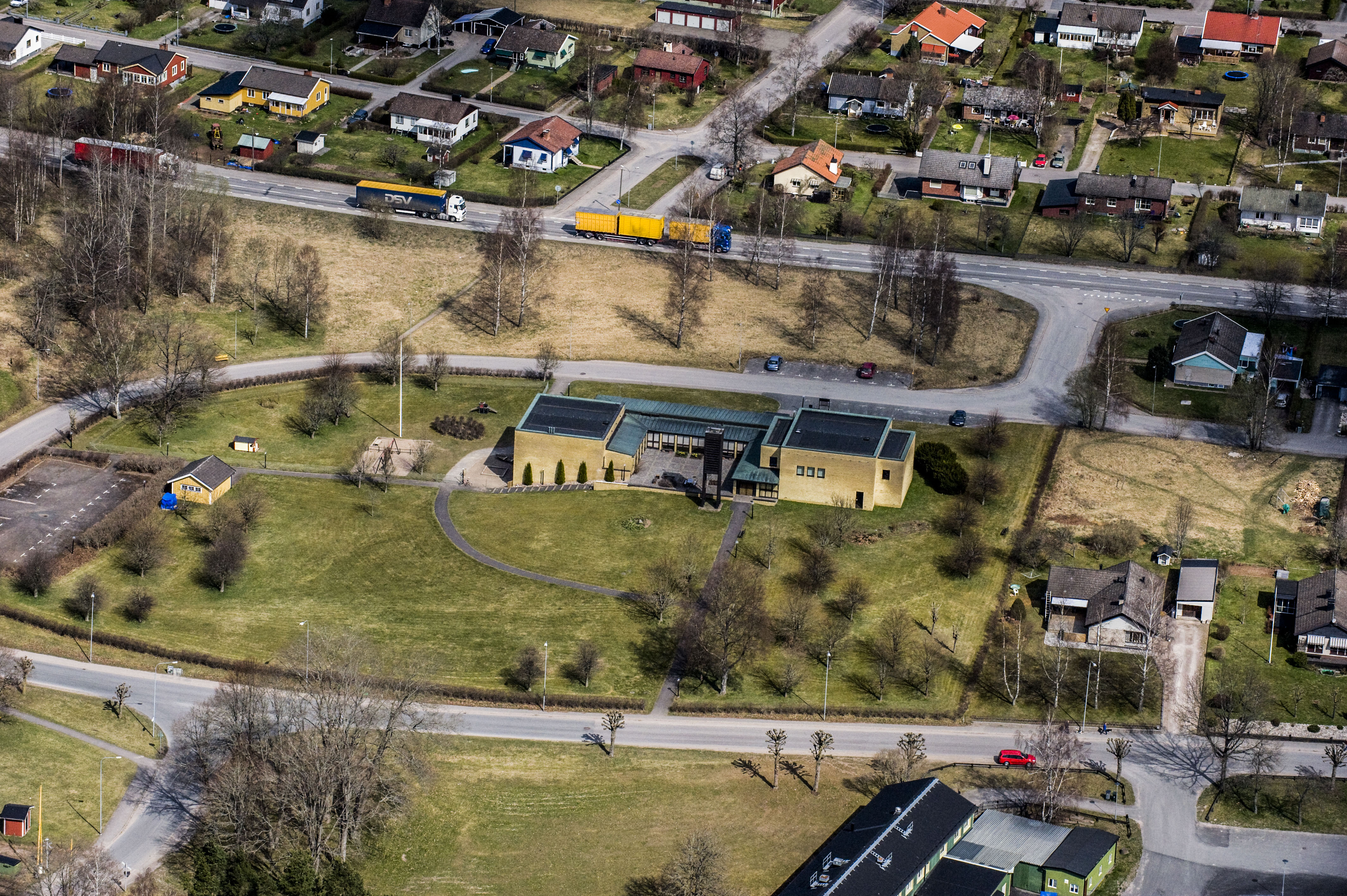 Ekenässjöns kyrka. Riksväg 31 i bakgrunden.